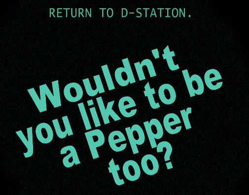 Les techniciens, complètement dépassés, assistent aux premières manifestations de personnalité du Numéro 5, dans le film Short Circuit. Les réponses du robot sont erratiques et absurdes… Ici, une publicité pour la boisson Dr Pepper. « Wouldn't you like to be a pepper too? » Œuvre personnelle réalisée à l'aide du logiciel Photoimpact, reproduisant librement l'image originelle publiée en fair use sur le site Wikipédia anglophone. Auteur/Date Création de Denis_48, le 29 septembre 2007 à 14:00 (CET).